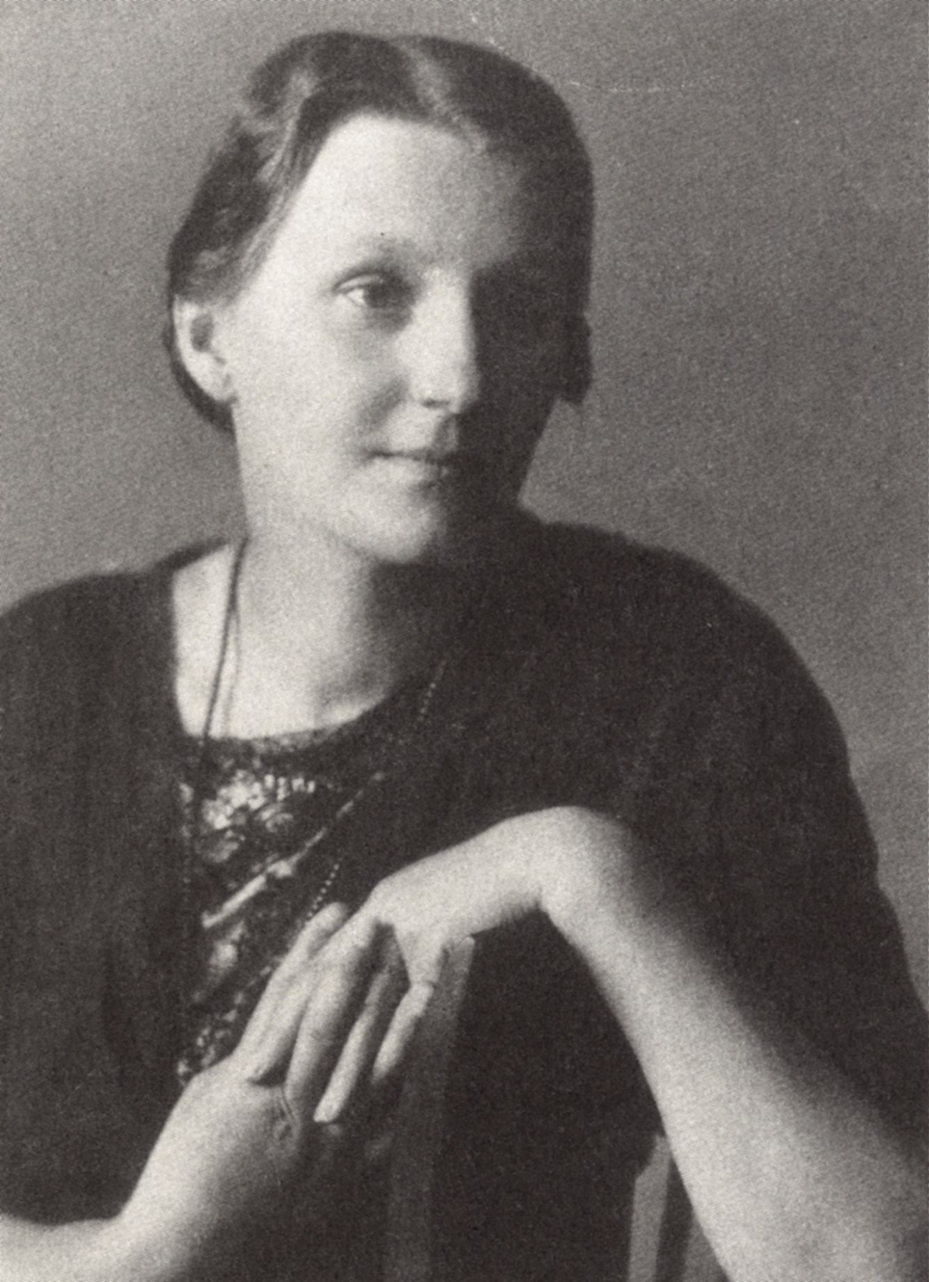 Portrait - Lena Christ